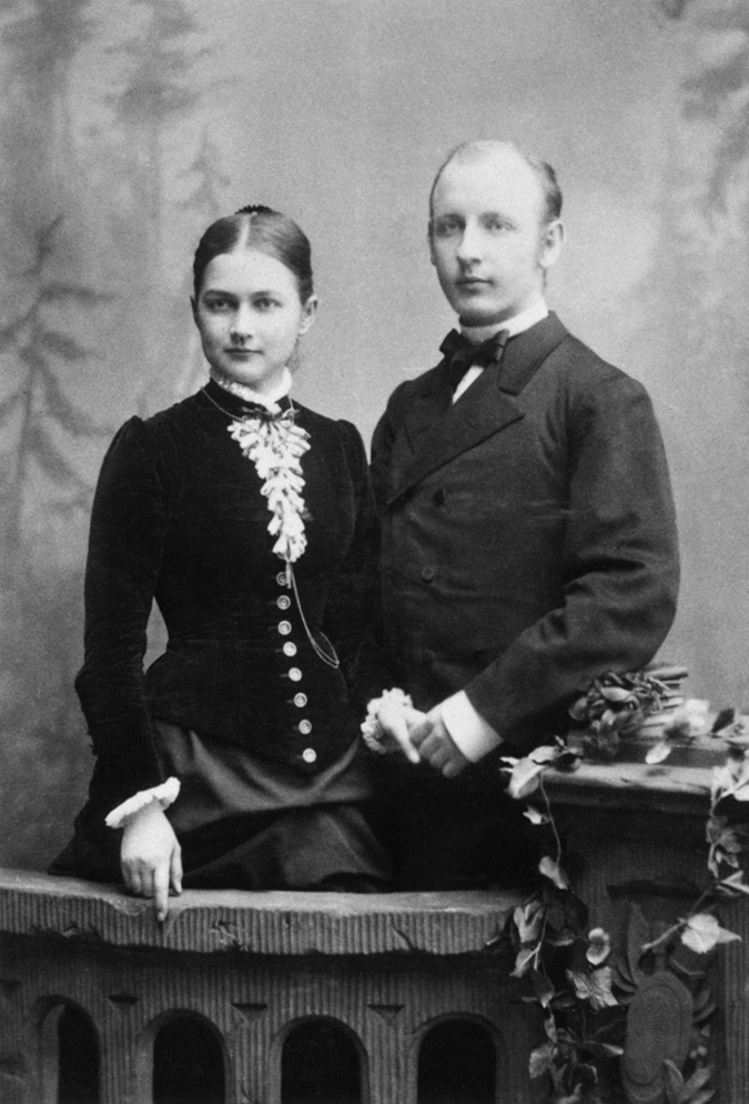 Carl Paul (1857–1927) und Marie Elisabeth Fritzsche (1861–1942) verlobten sich im Jahr 1884 in Rothschönberg. Carl Paul war Pfarrer in Rothschönberg und Marie Elisabeth Fritzsche war Tochter des Pfarrers Theodor Ernst Julius Fritzsche (1828–1888) und dessen Ehefrau Marie Luise geborene Hofmann (1834–1915) in Streumen. Sie heirateten am 22. Oktober 1884 in Streumen.